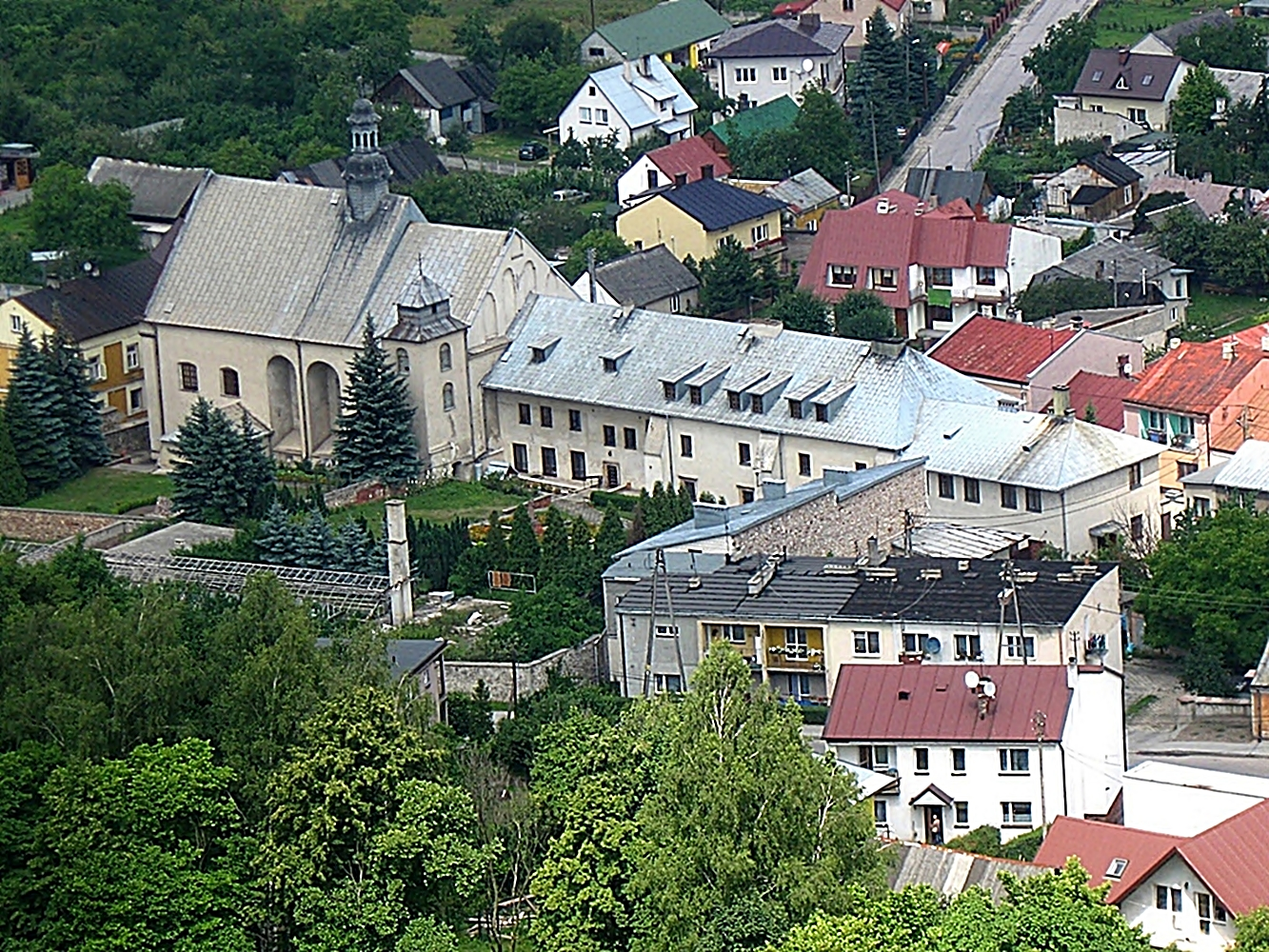 widok z zamku 233/1-3.